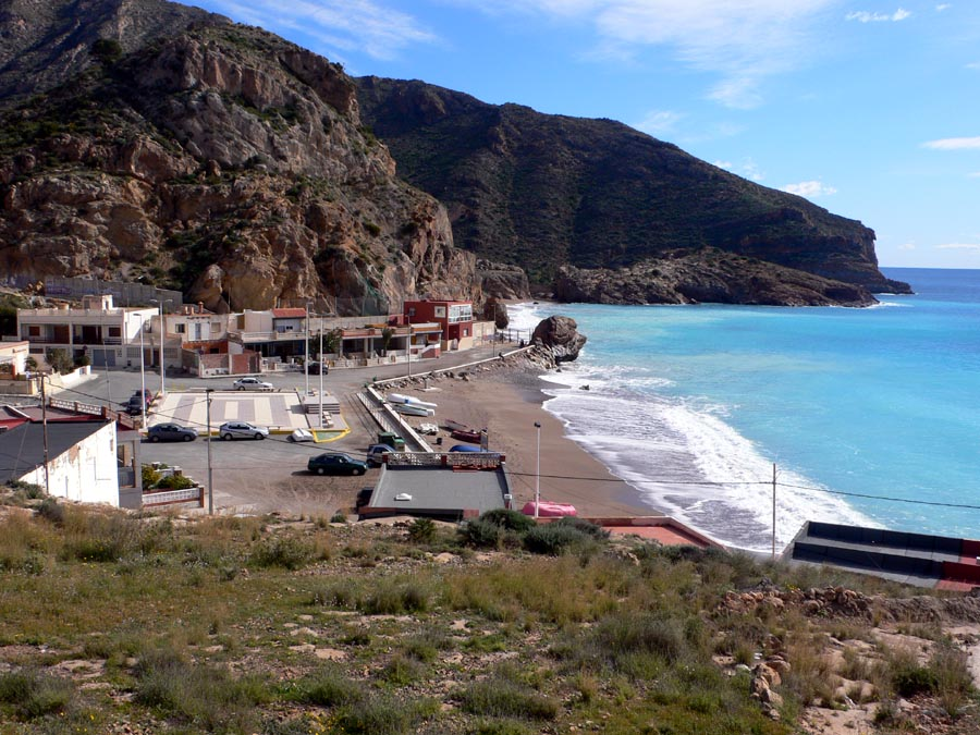 Playa de El Portús (Cartagena, España)